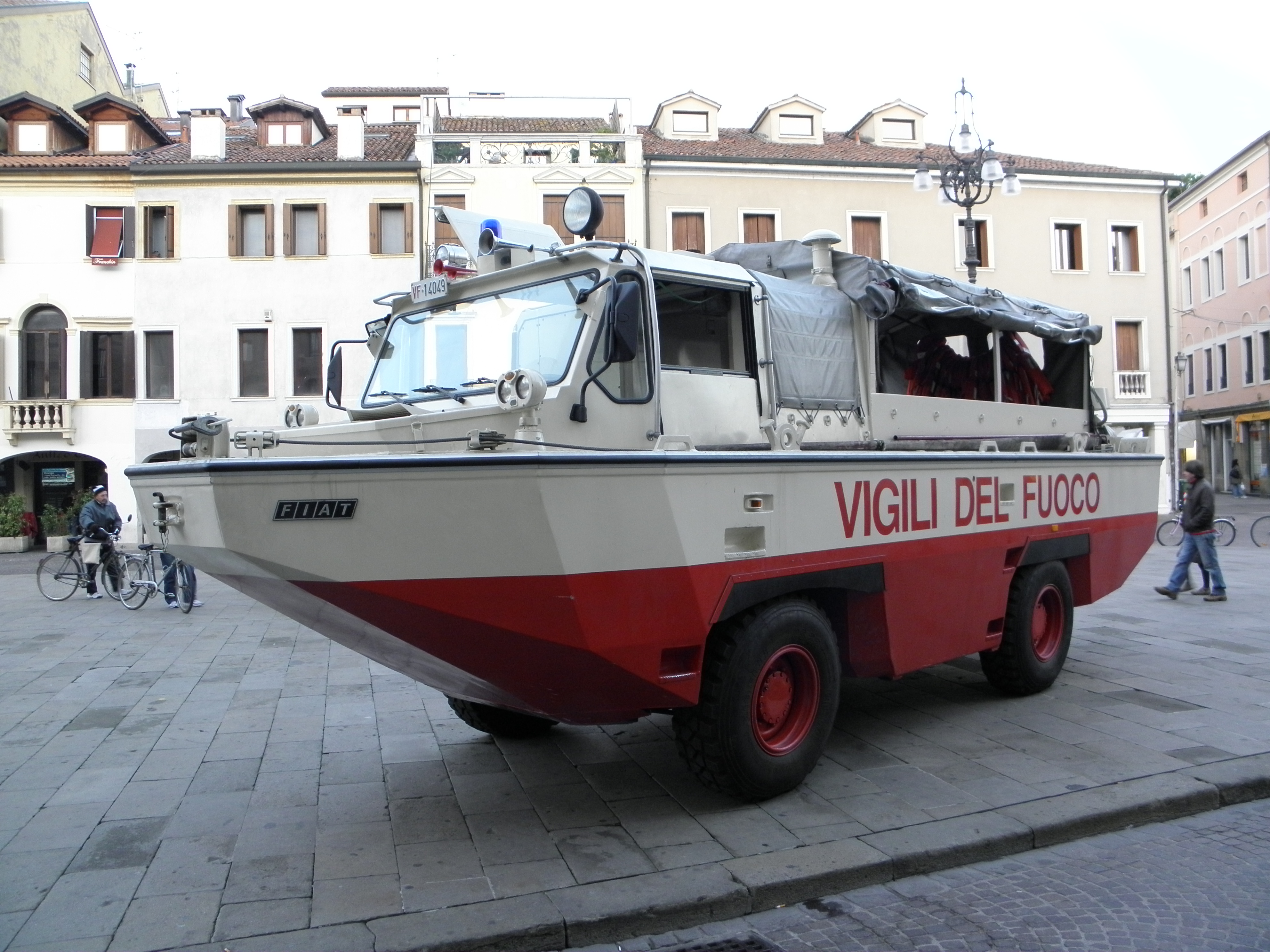 Fiat 6640 AMDS, veicolo storico anfibio dei Vigili del Fuoco. Foto scattata in occasione della manifestazione svolta a Rovigo il 13 novembre 2011 in ricordo dell'alluvione del Polesine del 1951.